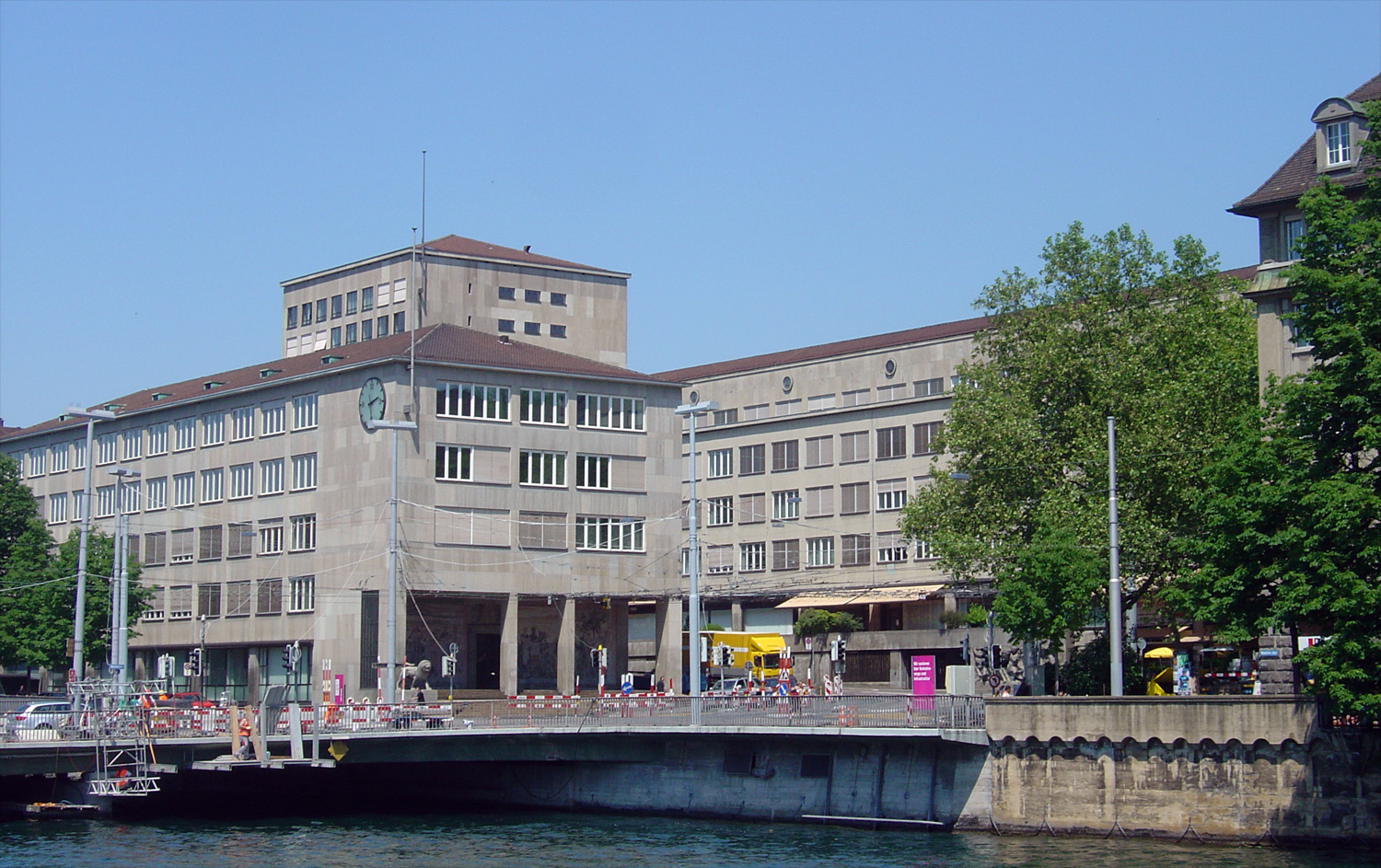 Die Walche in Zürich